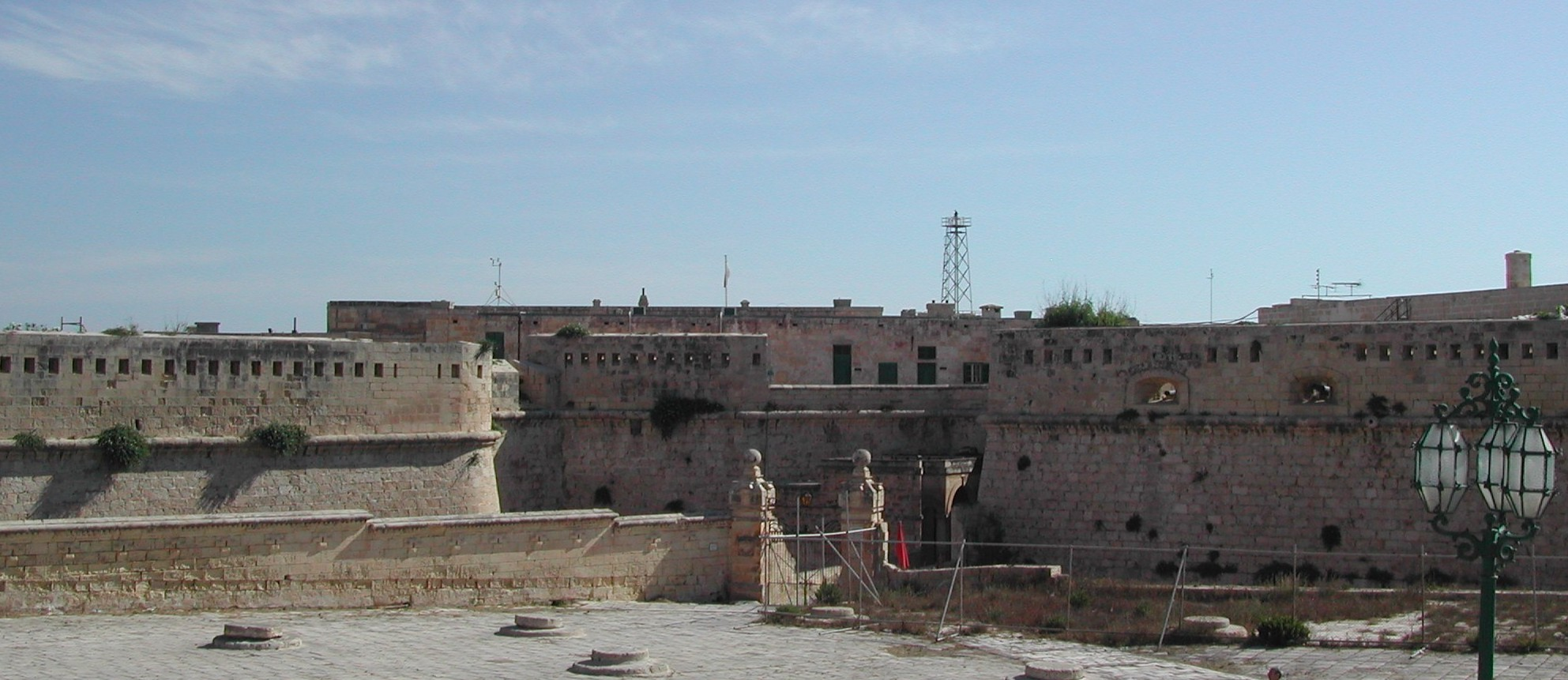 De Fort St. Elmo zu Valetta. Kategorie:Malta Kategorie:Festungen